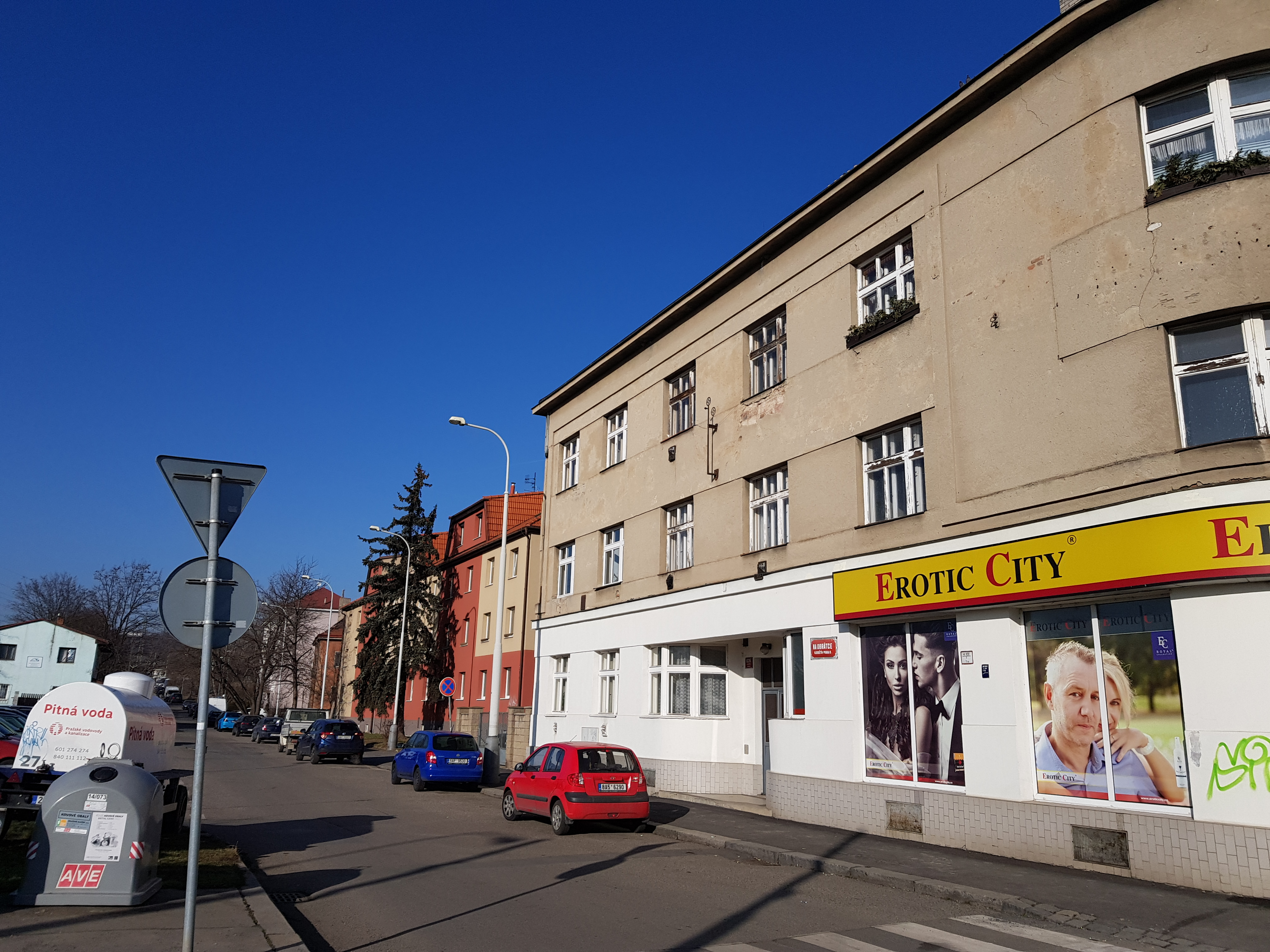 Ulice Na Obrátce, Praha 14 - Hloubětín, pohled od Poděbradské na sever